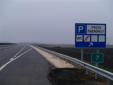 Az M35-ös autópálya a pródi pihenő előtt